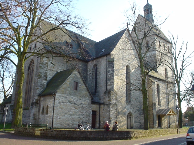 Salzkotten: katholische Kirche Sankt Johannes Enthauptung